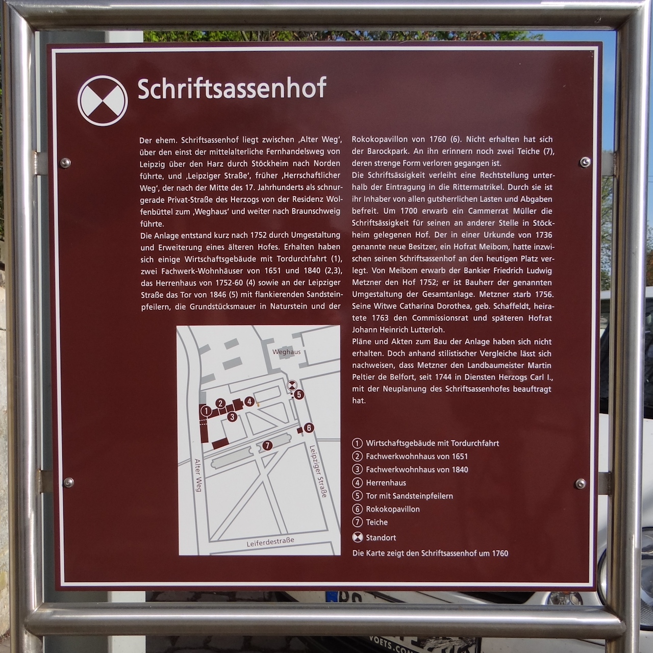 BLIK-Informationstafel am Schriftsassenhof in Stöckheim (Braunschweig). BLIK ist das Braunschweiger Leit- und Informationssystem für Kultur.